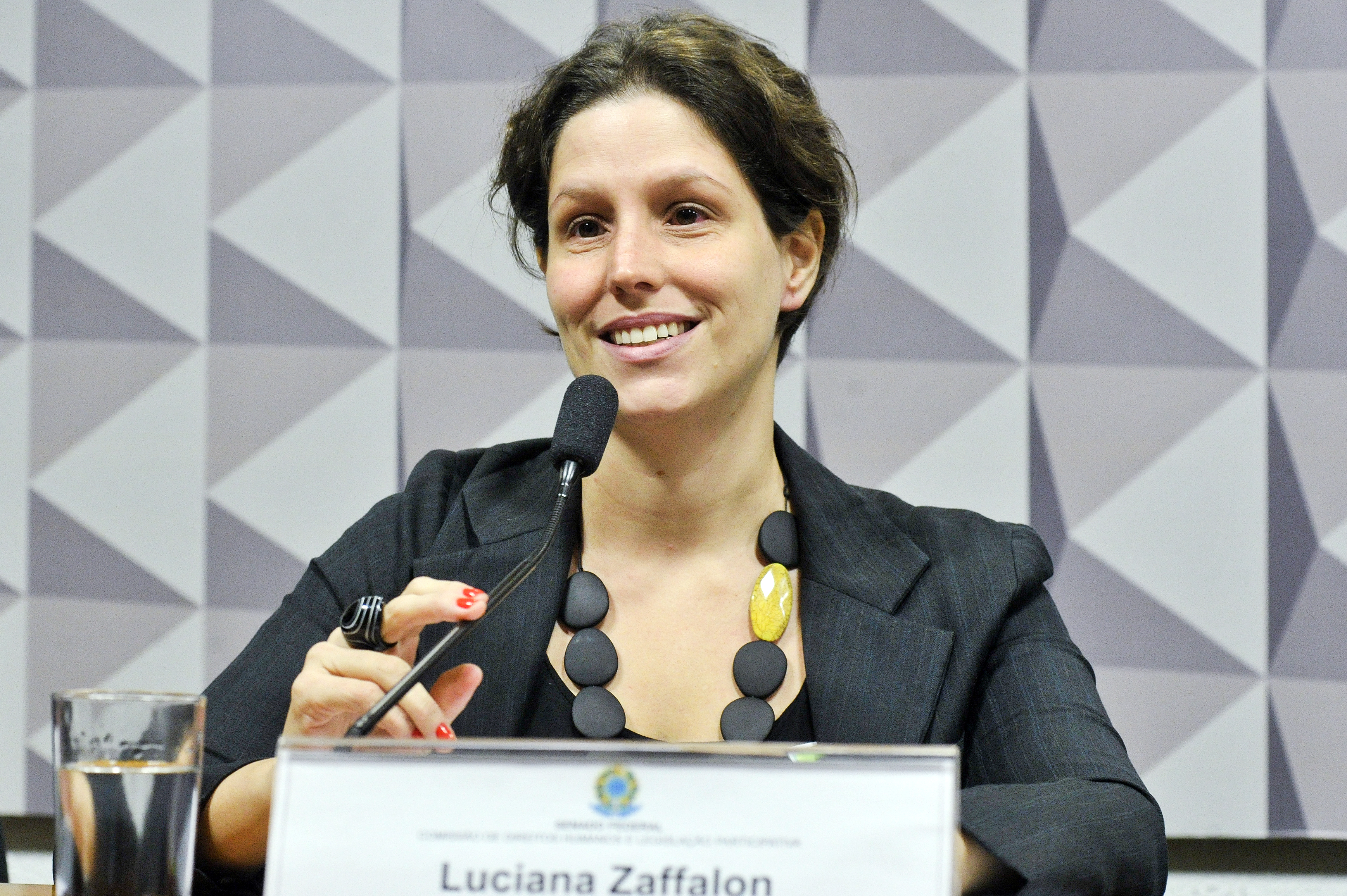 Comissão de Direitos Humanos e Legislação Participativa (CDH) realiza audiência interativa para debater a privatização do sistema prisional brasileiro. Entre os convidados estão representantes do CNJ, da CNBB e Confederação dos Servidores Públicos do Brasil . Em pronunciamento, supervisora de Atuação Política do Instituto Brasileiro de Ciências Criminais (Ibccrim), Luciana Zaffalon Foto: Geraldo Magela/Agência Senado